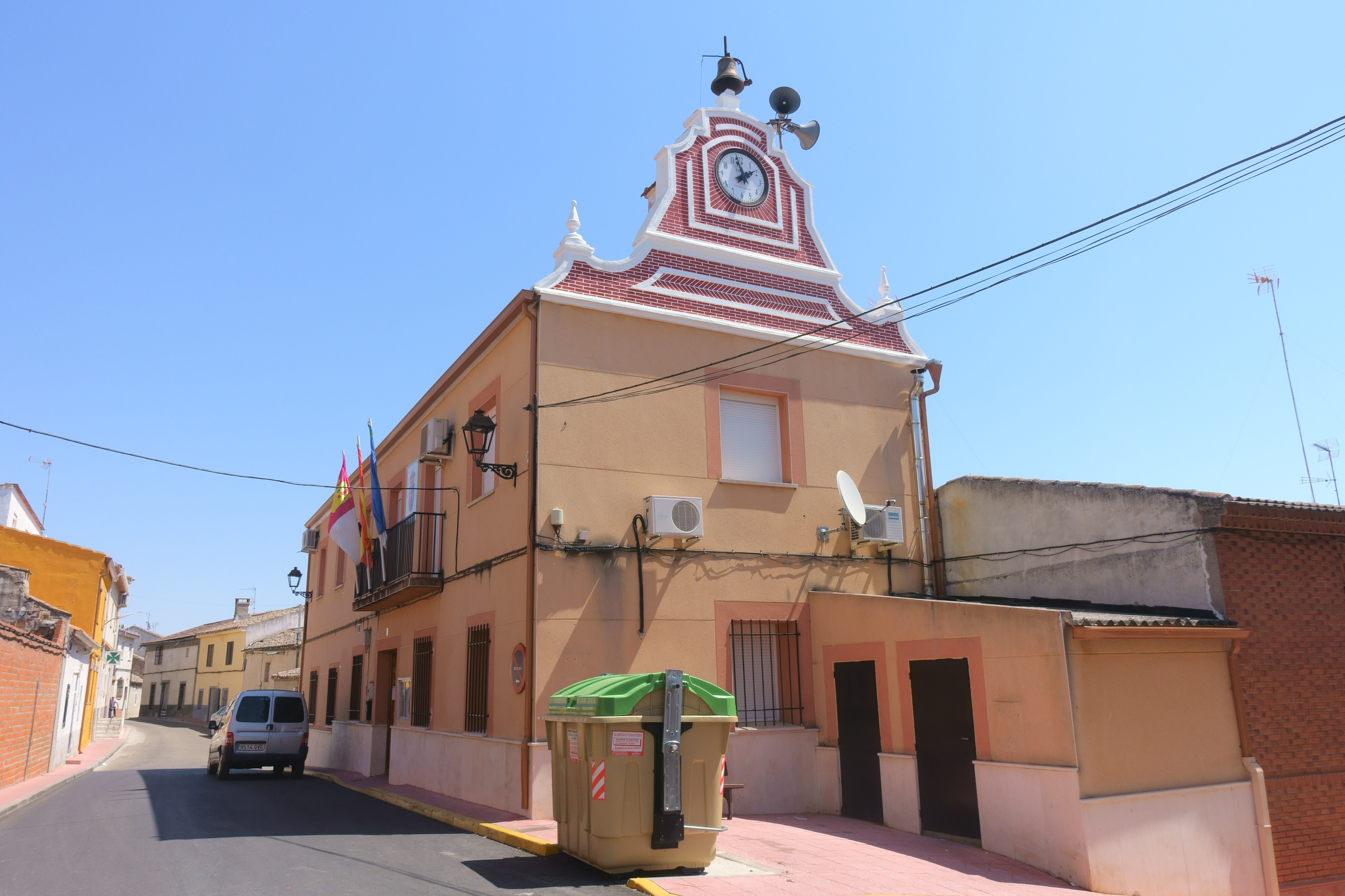 Casa consistorial de Montearagón (Toledo, España).